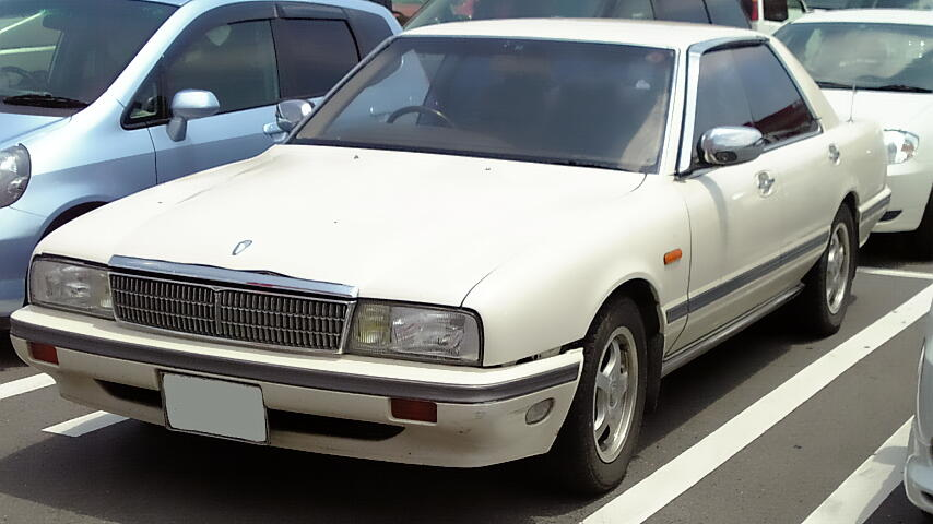 初代日産・シーマ